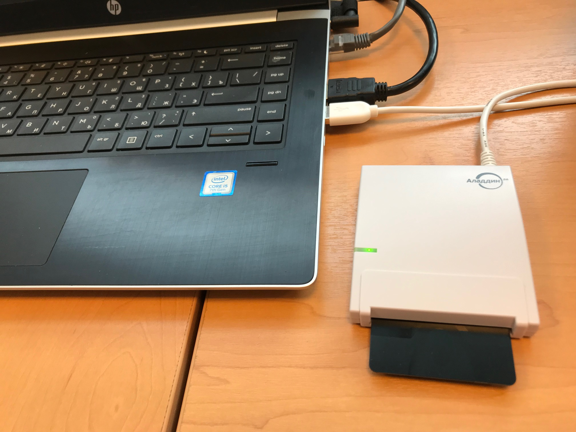 Доверенный смарт-карт ридер